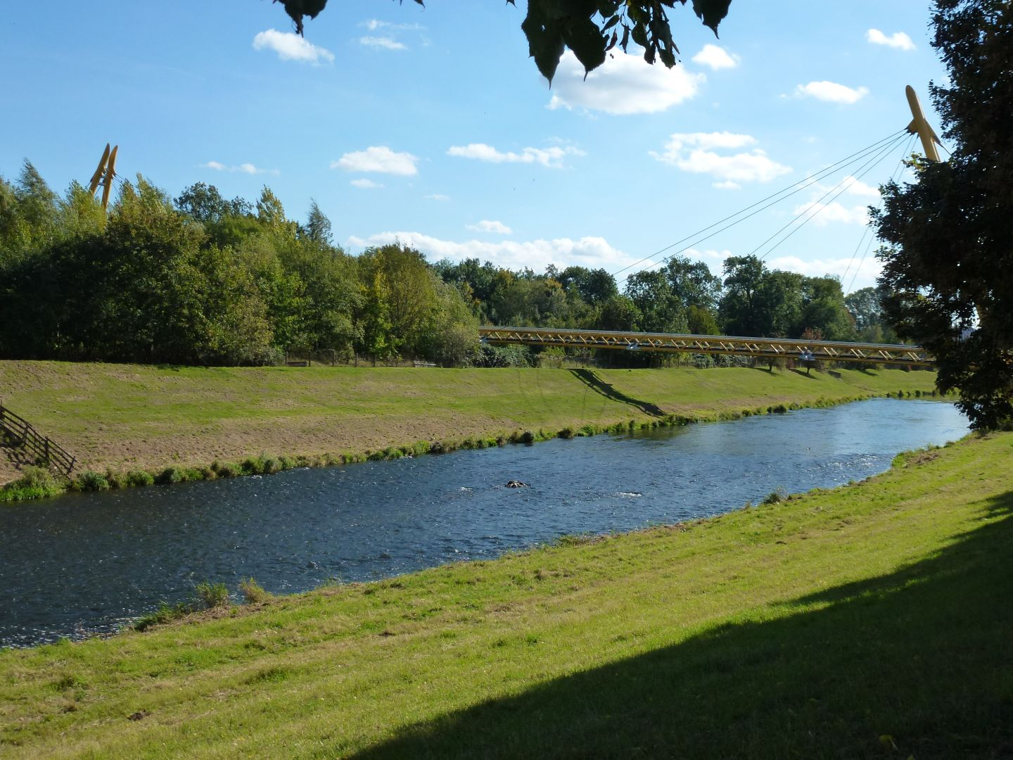 Fußgängerbrücke „Stadtbahnbrücke“ über die Weiße Elster im Norden Geras